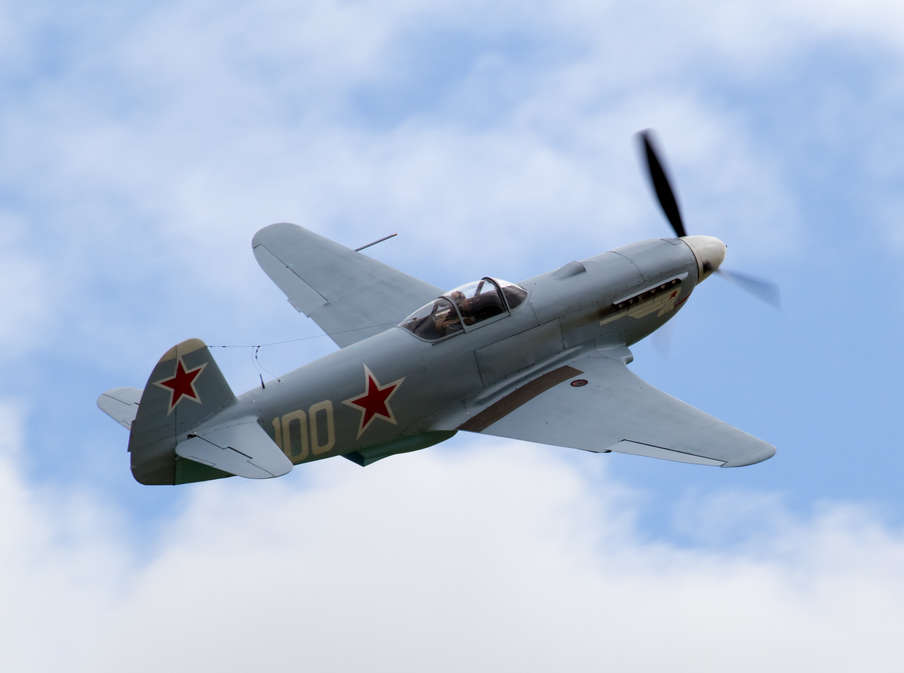 Yak 3M 1